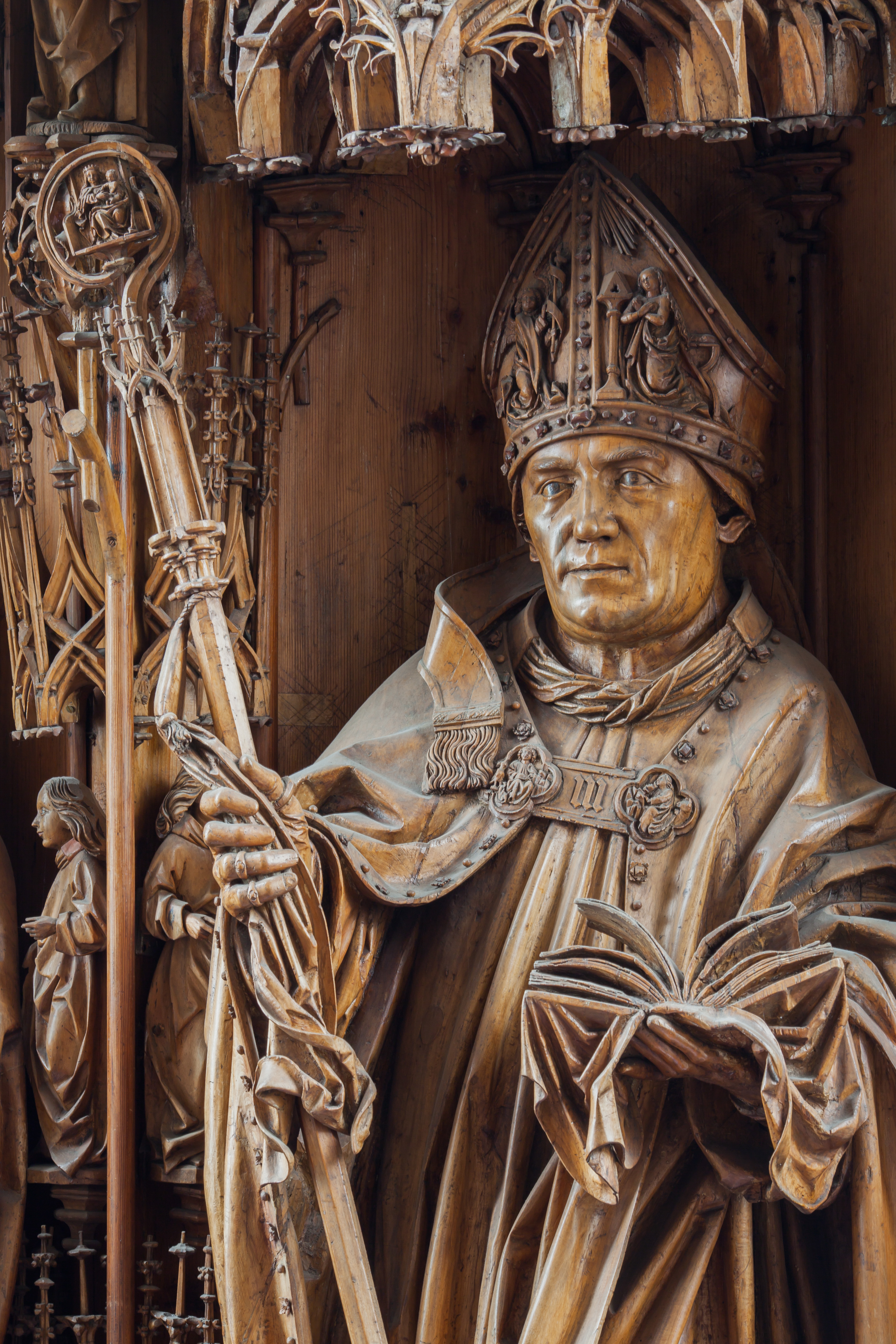 Der aus Lindenholz geschnitzte Hauptaltar wurde 1497 nach Beauftragung durch Kirchenerbauer Christoph von Zelking im Jahr 1490 und dessen Tod im Jahr 1491 von unbekanntem Meister fertiggestellt. Die 13,5 m x 6,5 m Größe verteilen sich auf Schrein, Gesprenge und Tafelbilder.